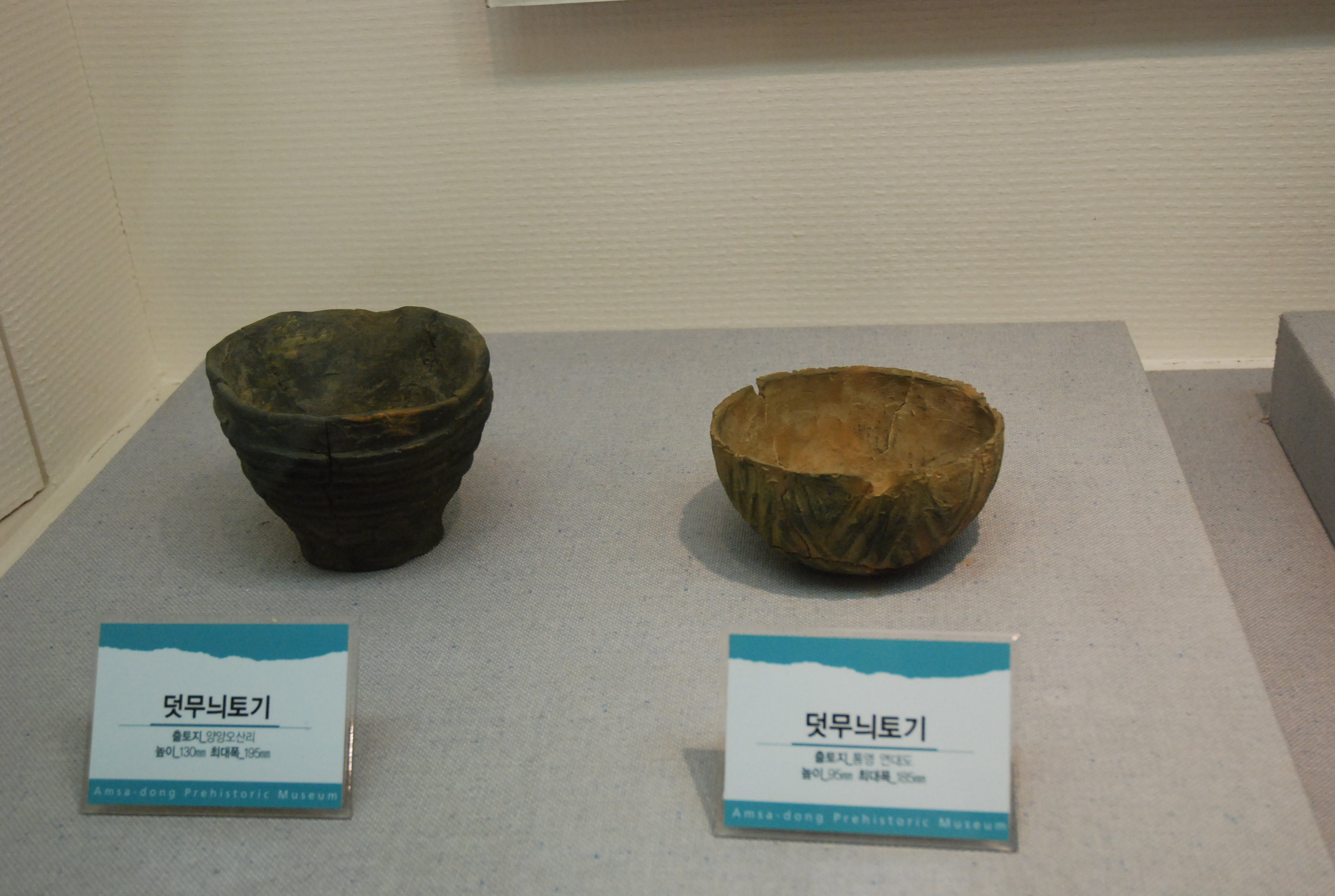 양양 오산리와 통영 연대도의 덧무늬토기